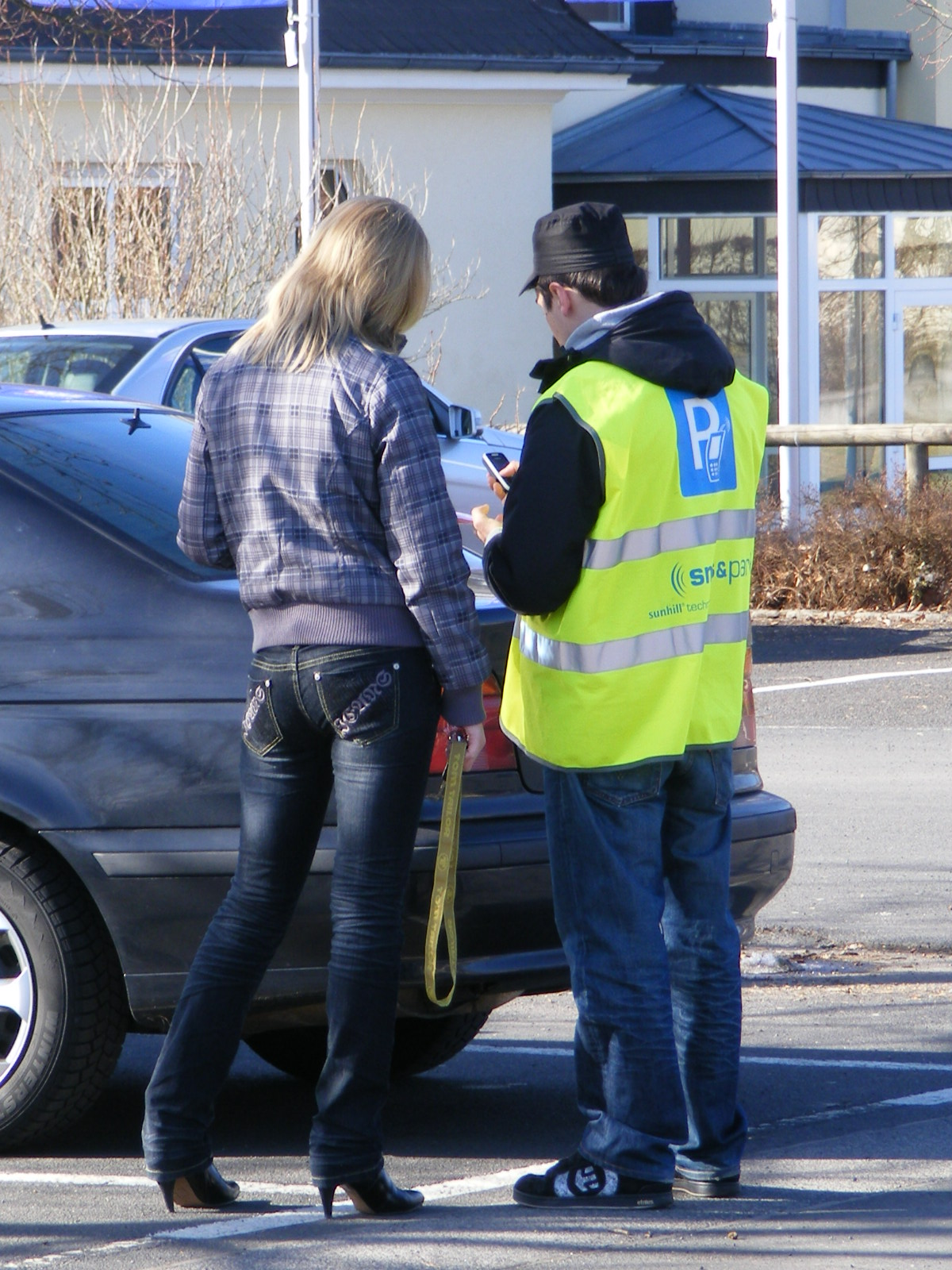 Assistent für das virtuelle Parkscheinlösen per SMS: Bad Kissingen, Großparkplatz Tattersall.